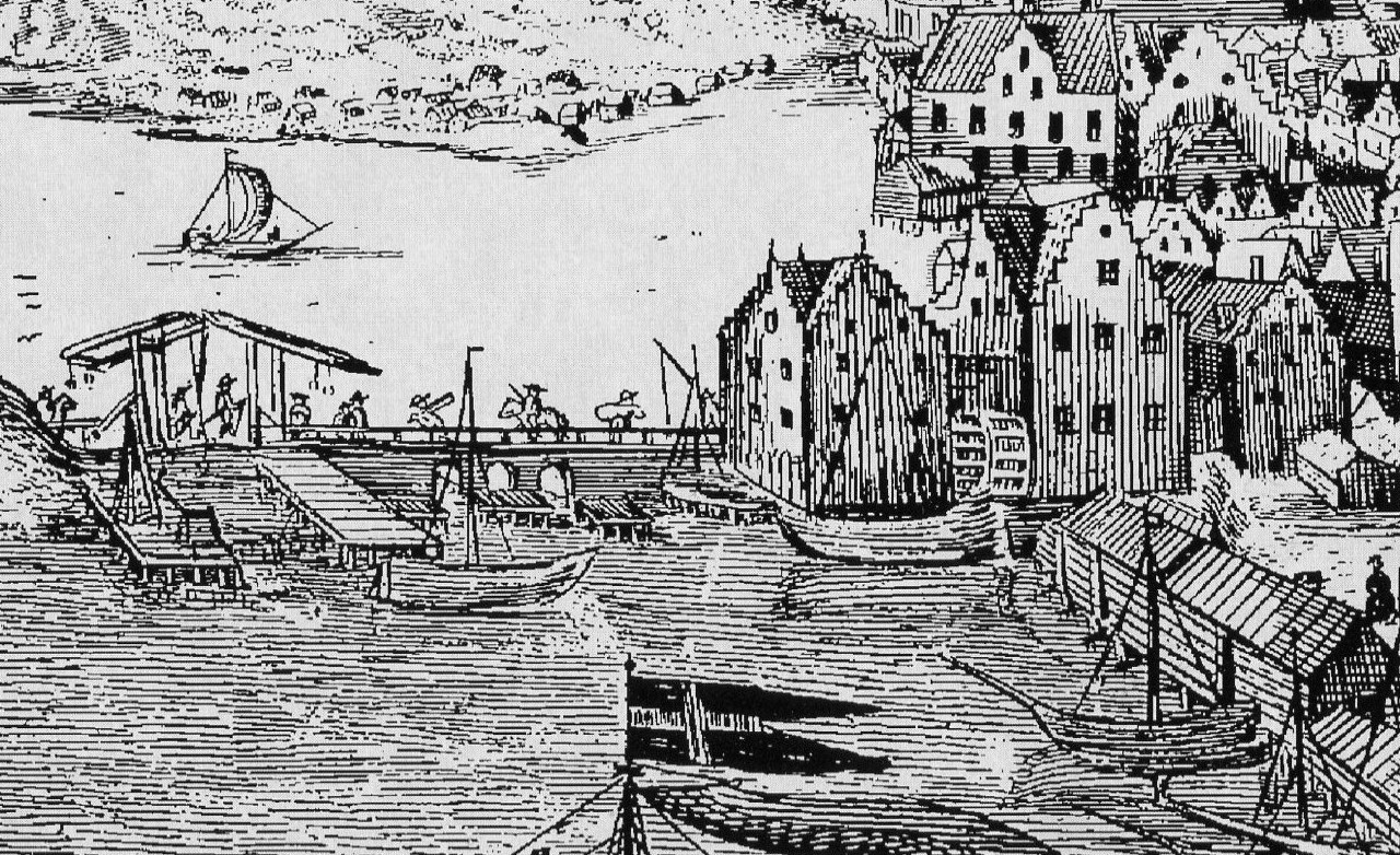 Gamla "Kristinas sluss" i Stockholm från 1642, Mälaren i bakgrunden. Till höger syns kvarnhuset med två vattenhjul.